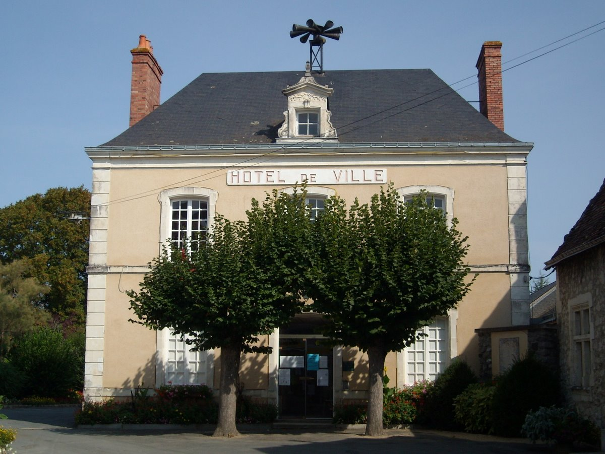 Mairie de Luché-Pringé